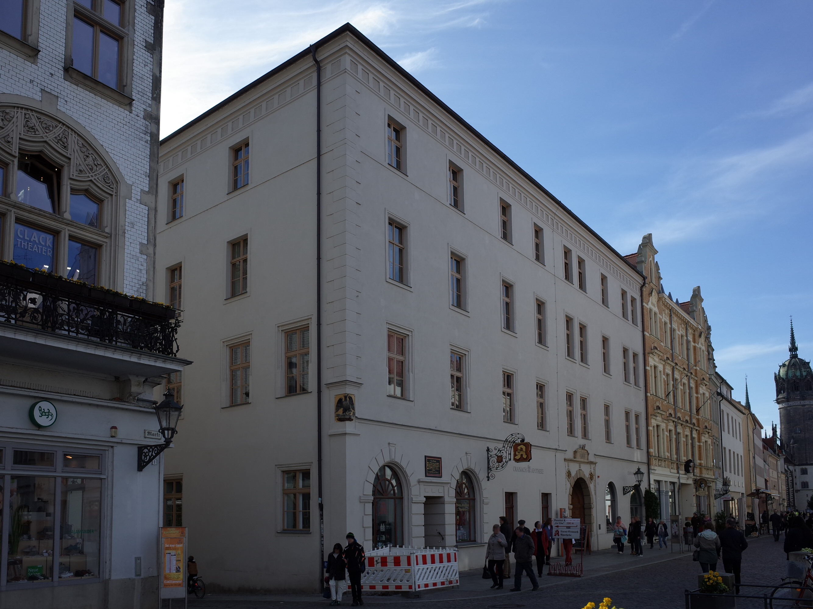 Lutherstadt Wittenberg, Schlossstraße 2, Cranach Apotheke (Baudenkmal im Denkmalverzeichniss Sachsen-Anhalt, Erfassungsnummer: 094 35995 000 000 000 000 [1])